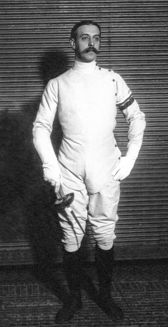 Armand Massard (cropped version of Le gala Kirchoffer : Massard et Surget).